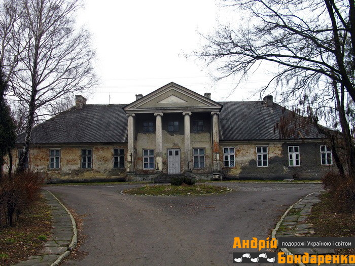 Вид з переду. Старий палац сім'ї Уруських у з с. Йосипівка, Буського району, Львівської області. Зараз там знаходиться лікарня.